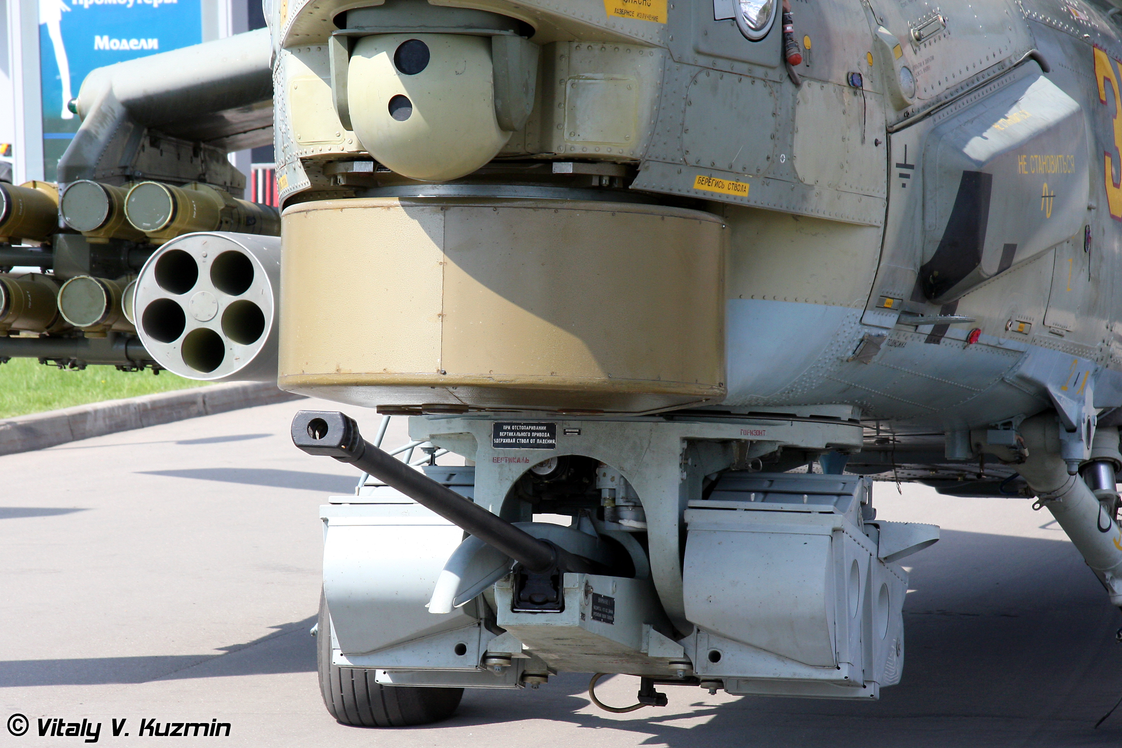 30-мм пушка 2А42 (30-mm 2A42 gun)